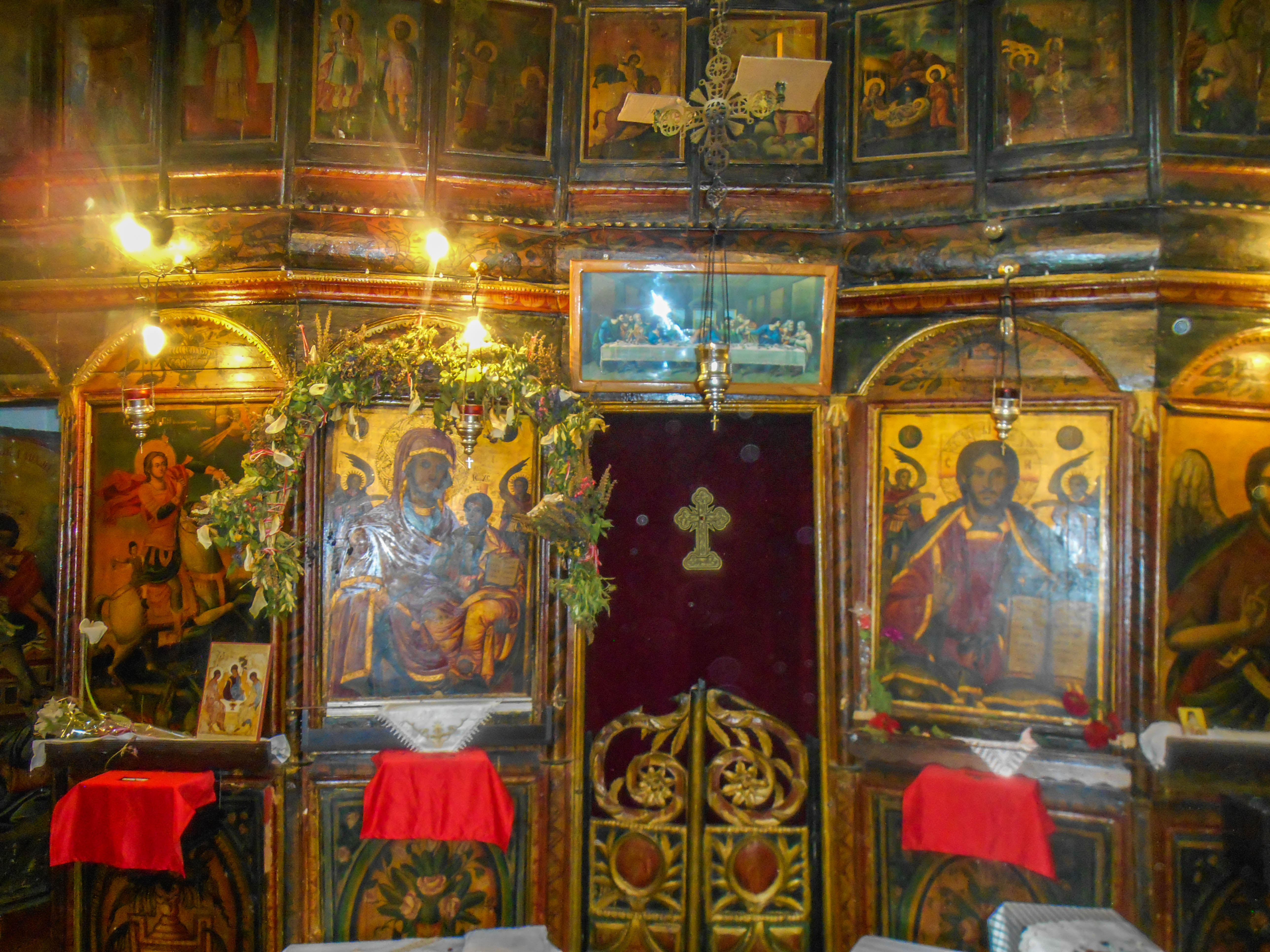 Црква „Св. Ѓорѓи“ - Пиперево